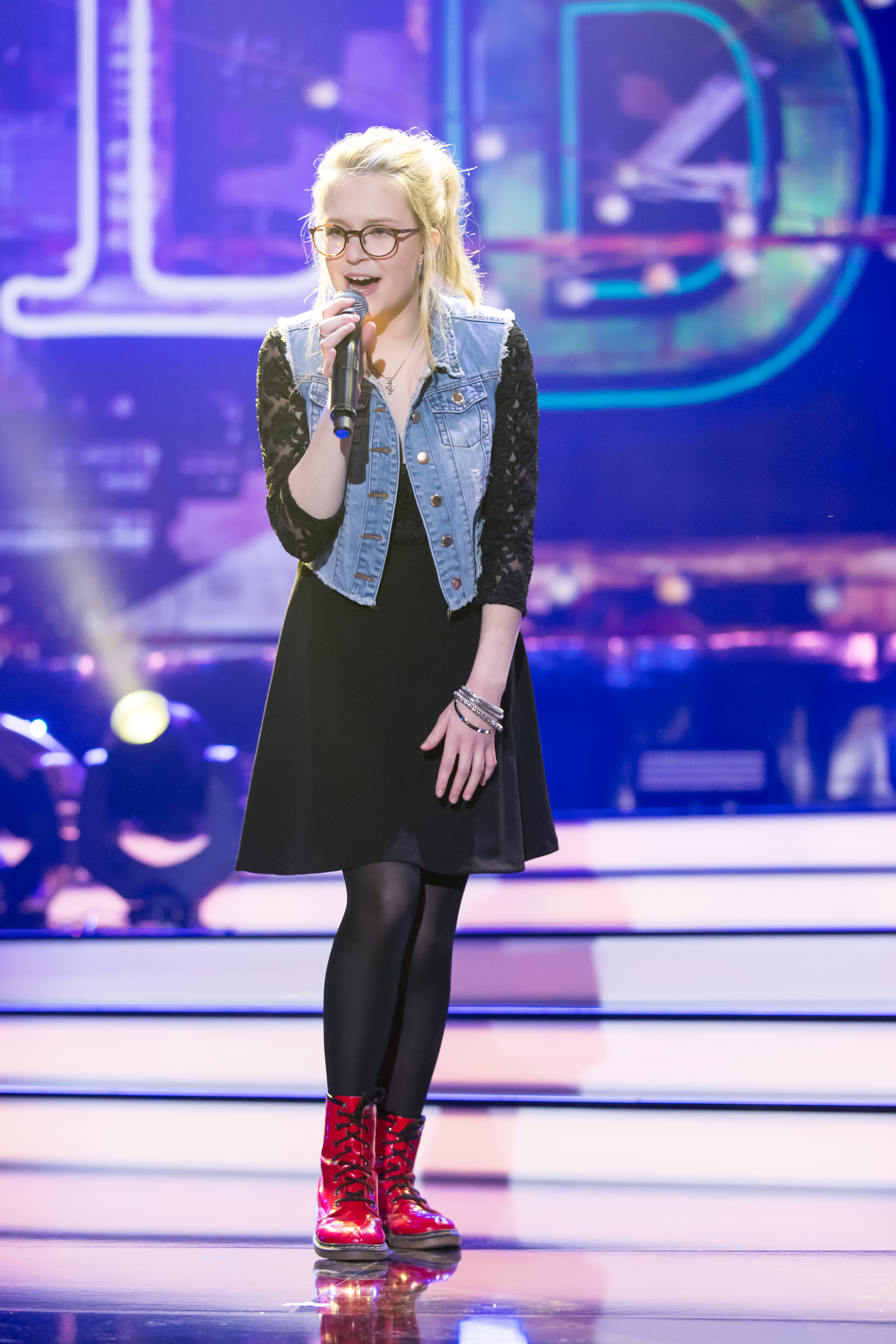 Unser Song 2017 (Probentag) für Eurovision Song Contest 2017 during Eurovision Song Contest - Unser Song 2017 at , Köln, Nordrhein-Westfalen, Germany on 2017-02-08, Photo: Sven Mandel